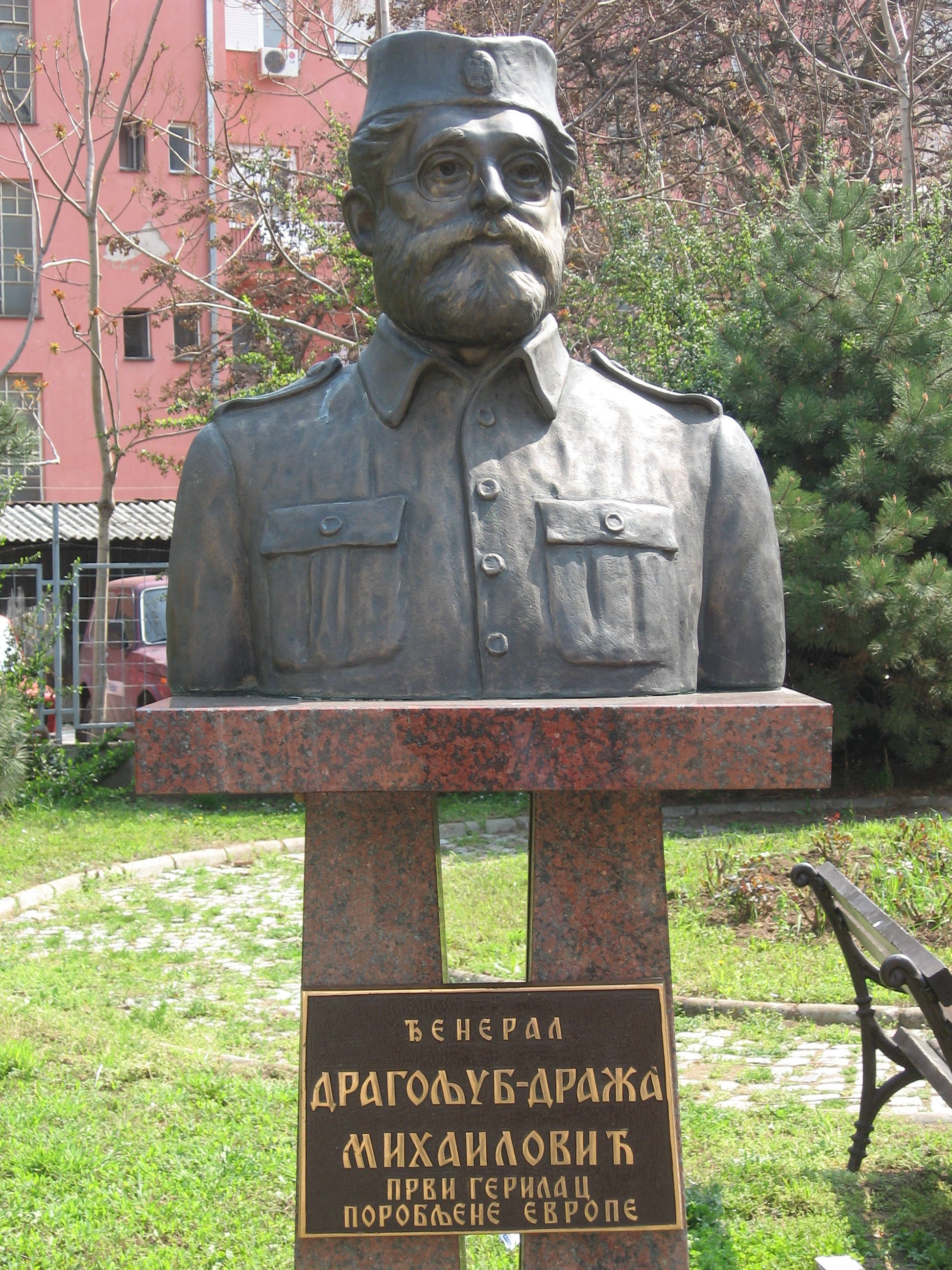 Spomenik Drazi Mihalovica u Nisu.